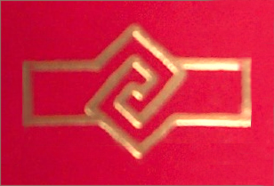 Käsi kädessä-merkki. Jos tiedät merkin oikean nimen, voit kirjoittaa sen tänne. user:Tuohirulla